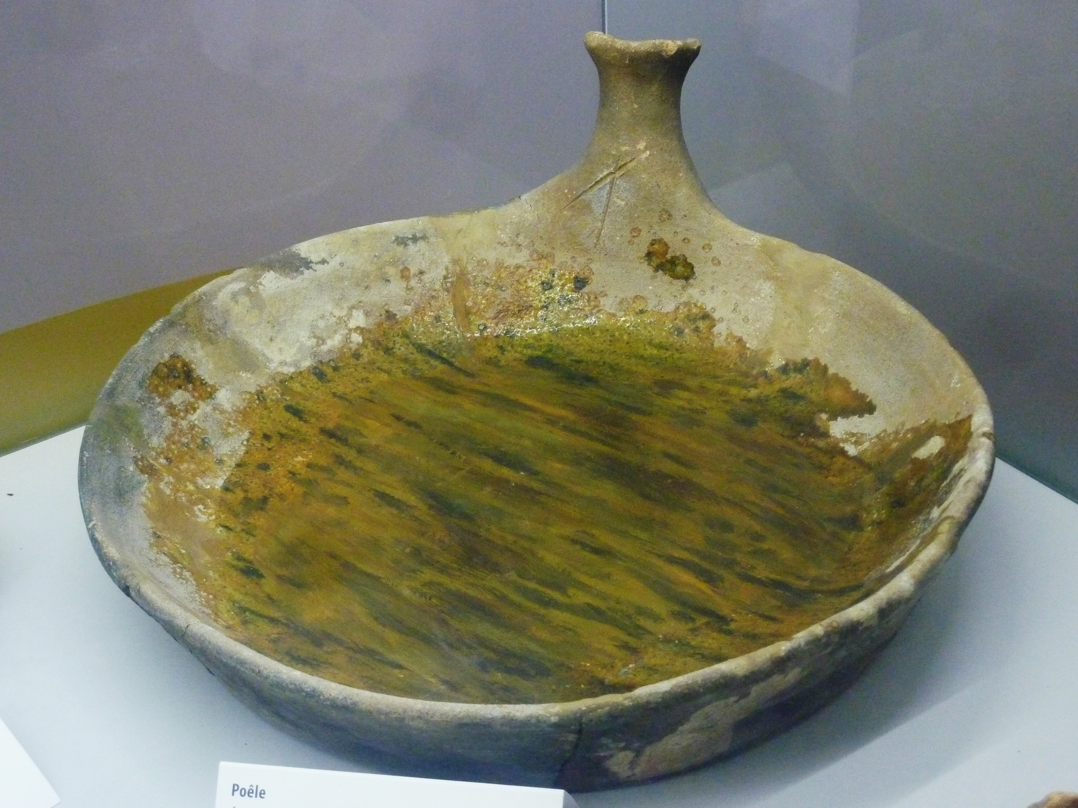 Poêle en terre cuite vernissée provenant du site du château de Joyeuse-Garde en La Forest-Landerneau (époque médiévale, musée du Léon de Lesneven).